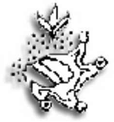 Glifo de Santa Cruz Atizapán